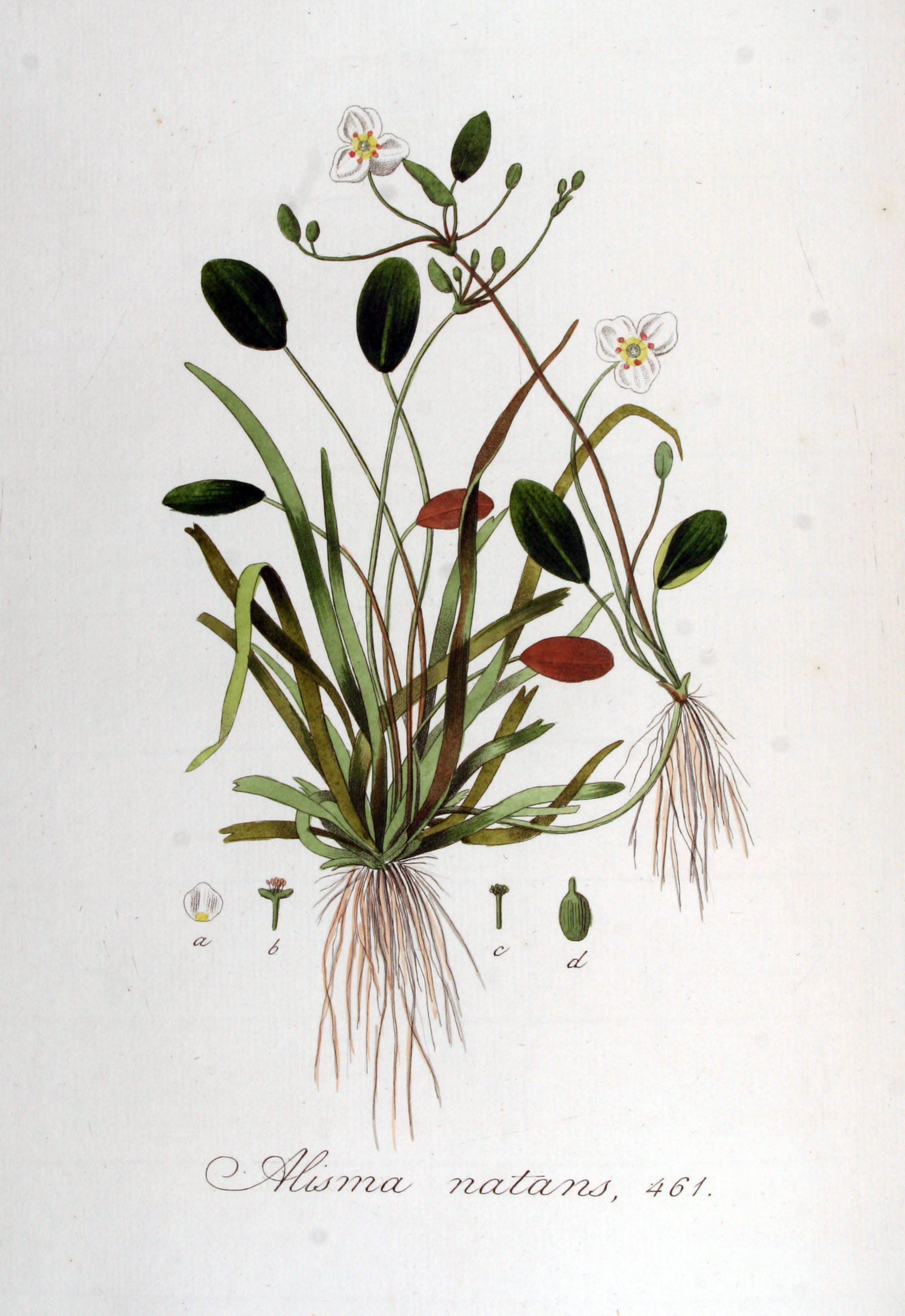 Luronium natans (L.) Rafin. (Syn. Alisma natans L.)